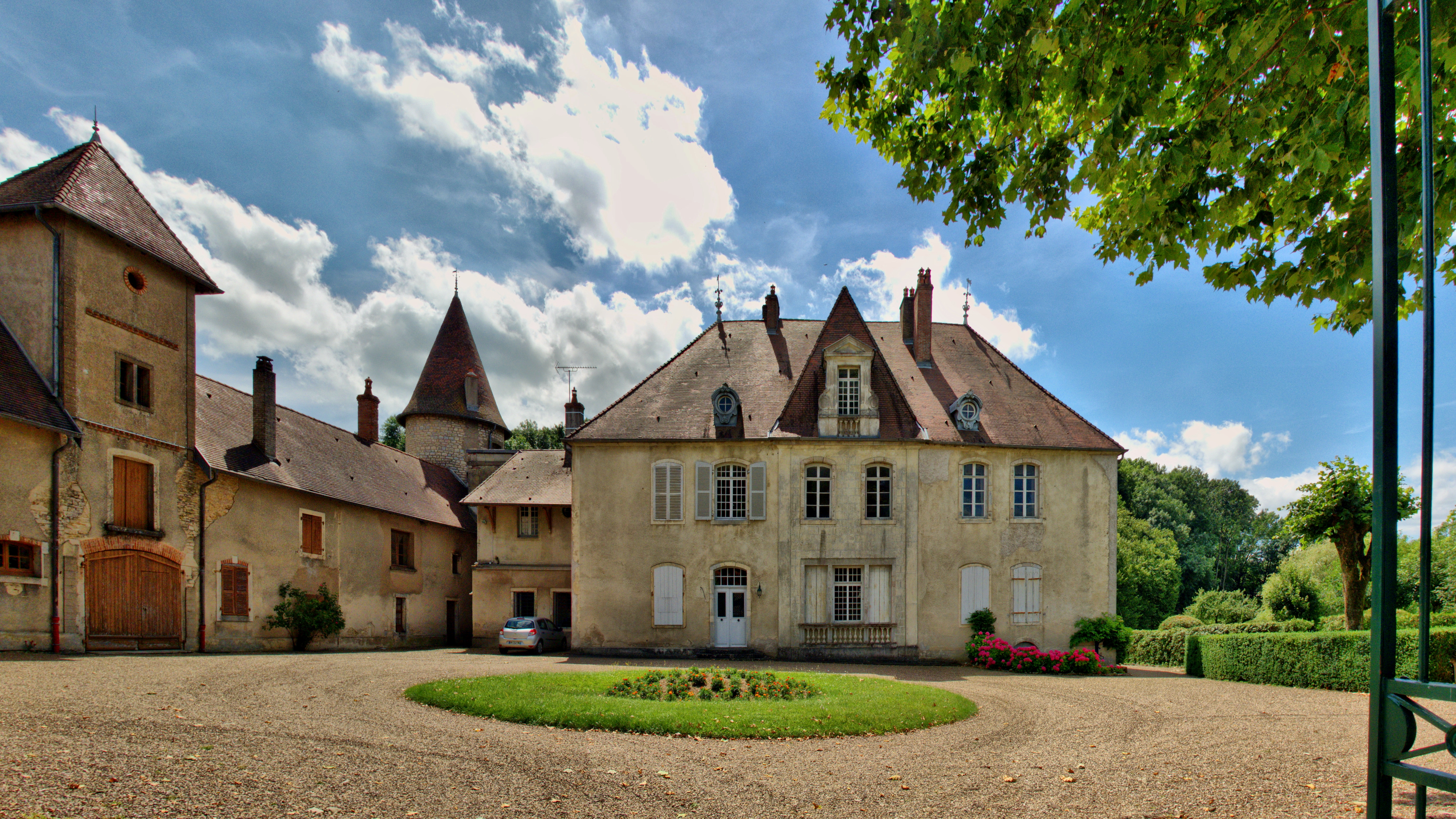 Le château